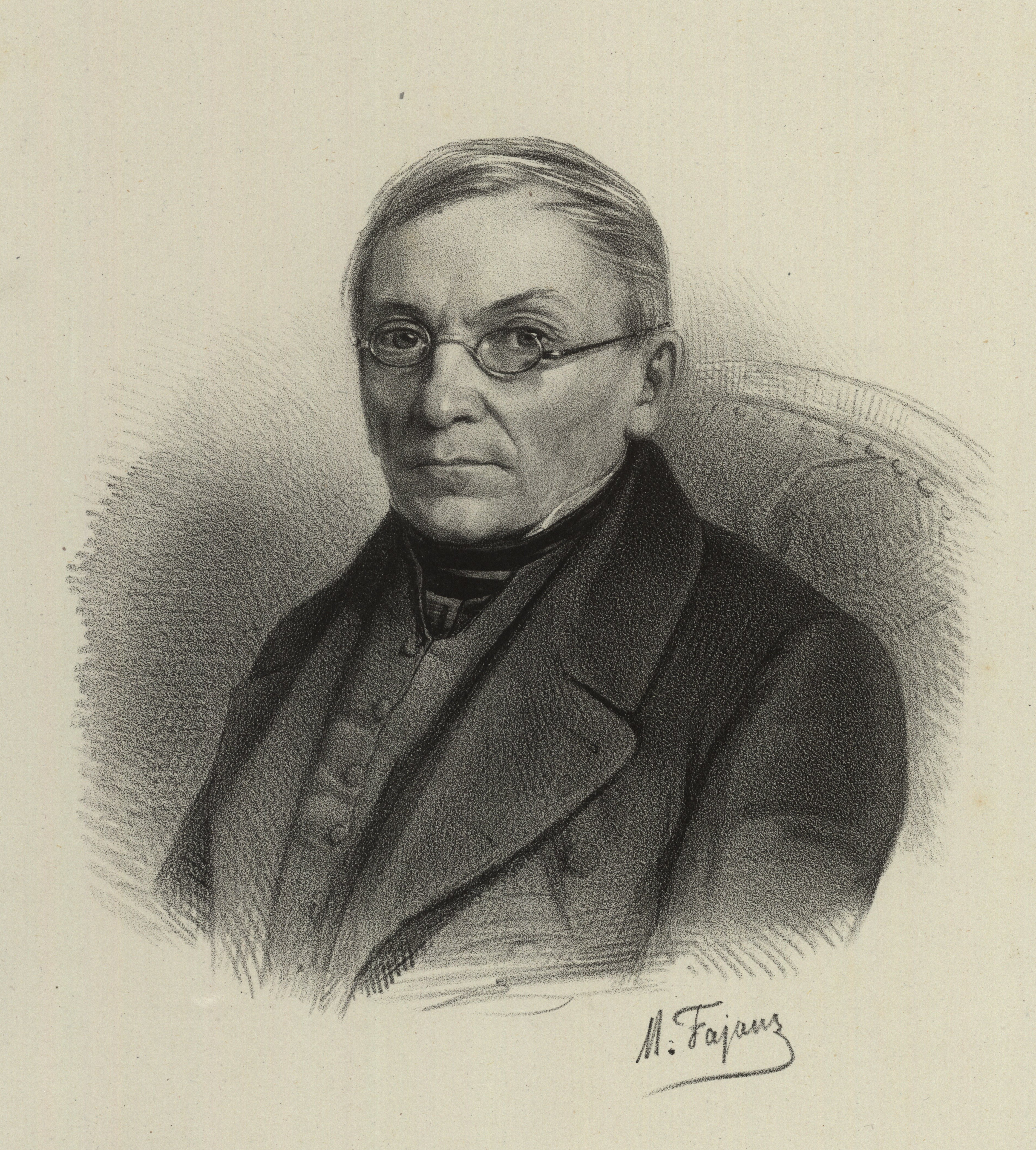 Antoni Waga, [1851-1962]